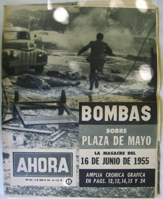 Un transeúnte corre entre cadáveres y escombros en revista "Ahora"